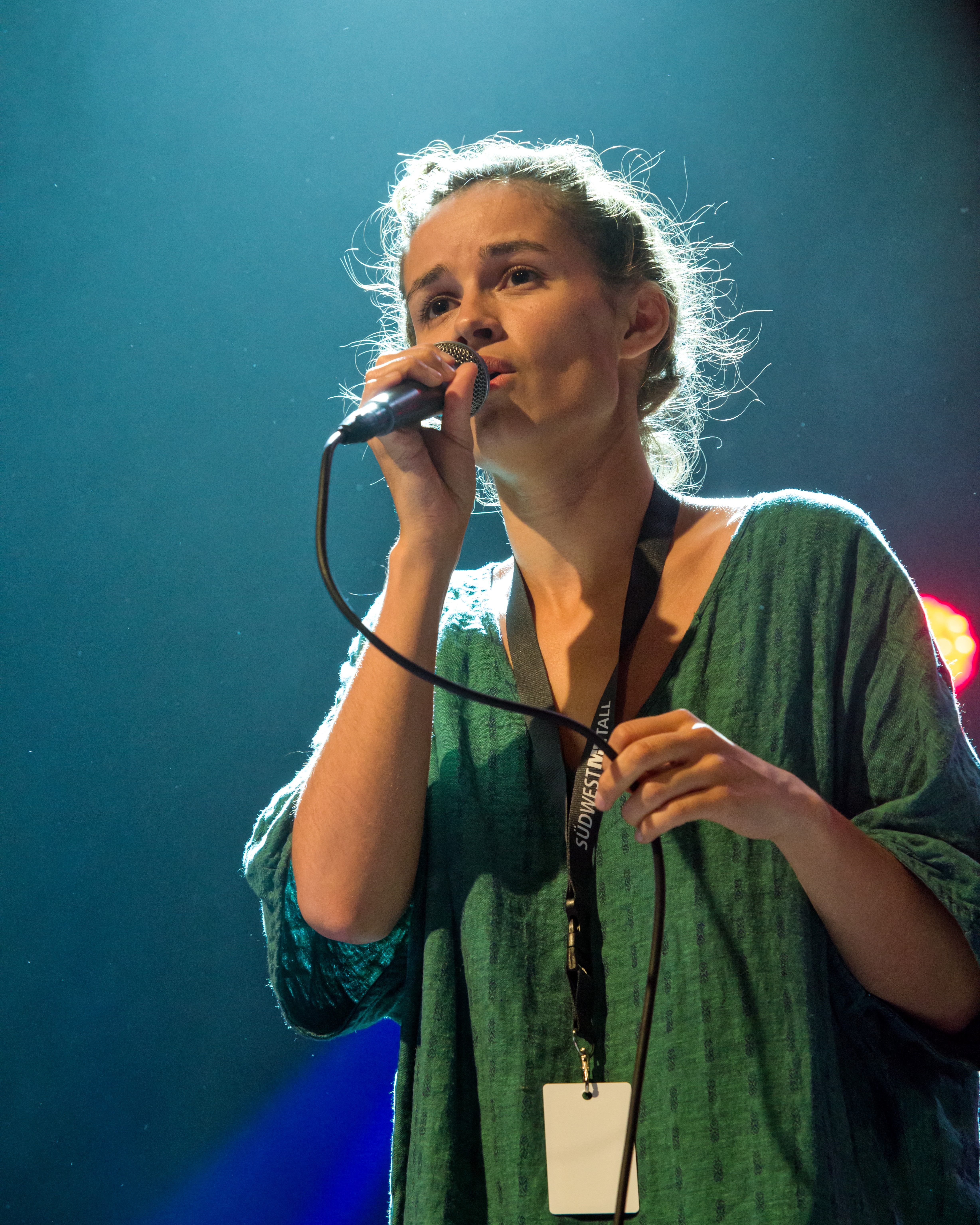 Bilder vom Zelt Musik Festival 2017 in Freiburg im Breisgau MOGLI am 13.07.2017